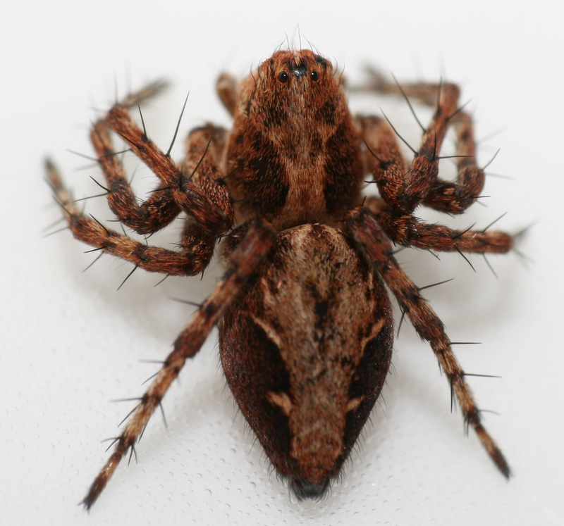 Oxyopes ramosus